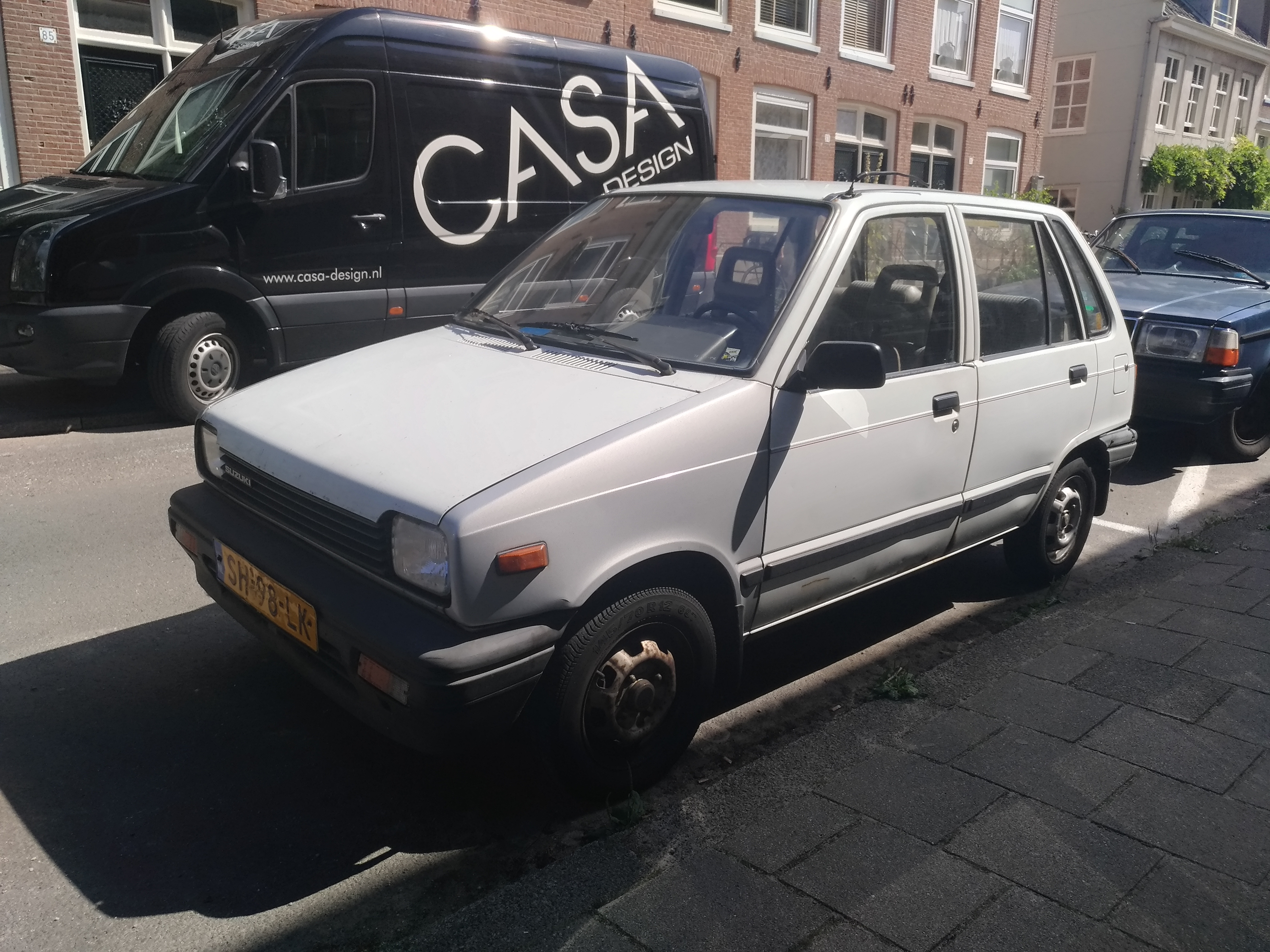 Suzuki Alto